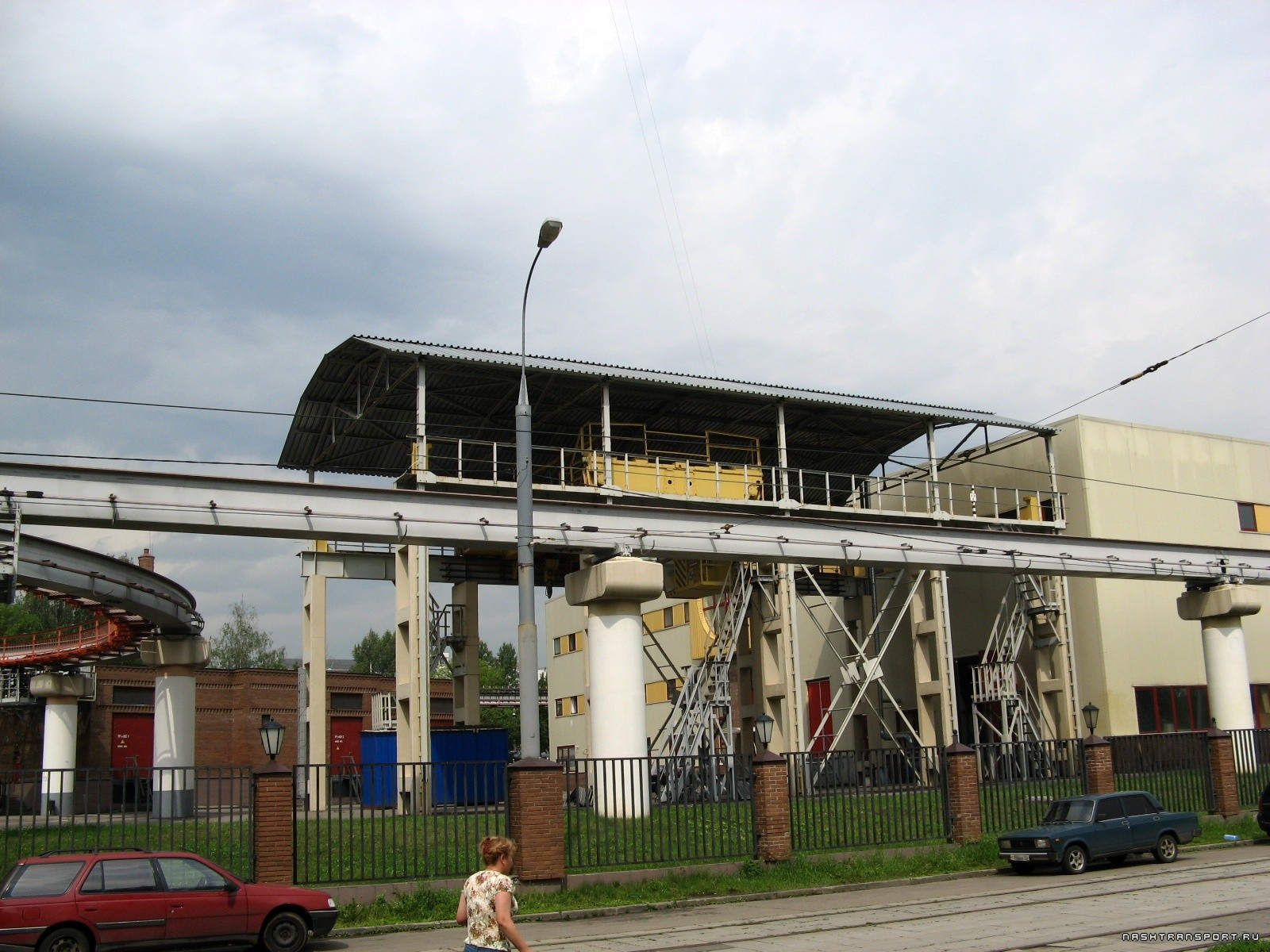 Техническая платформа в электродепо Ростокино Московского монорельса